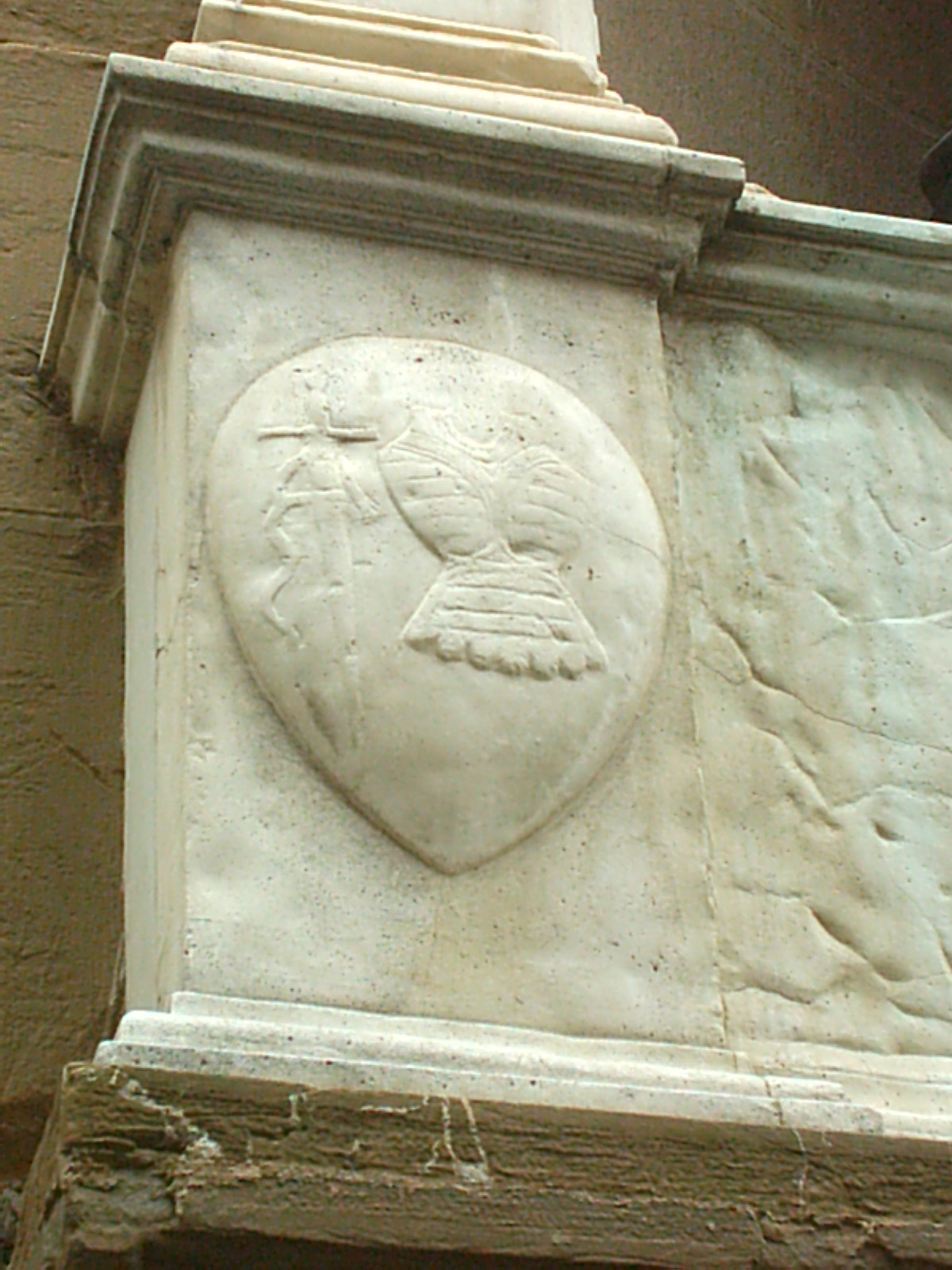 stemma dell'arte dei corazzai e spadai, dalla nicchia della corporazione in Orsanmichele a Firenze